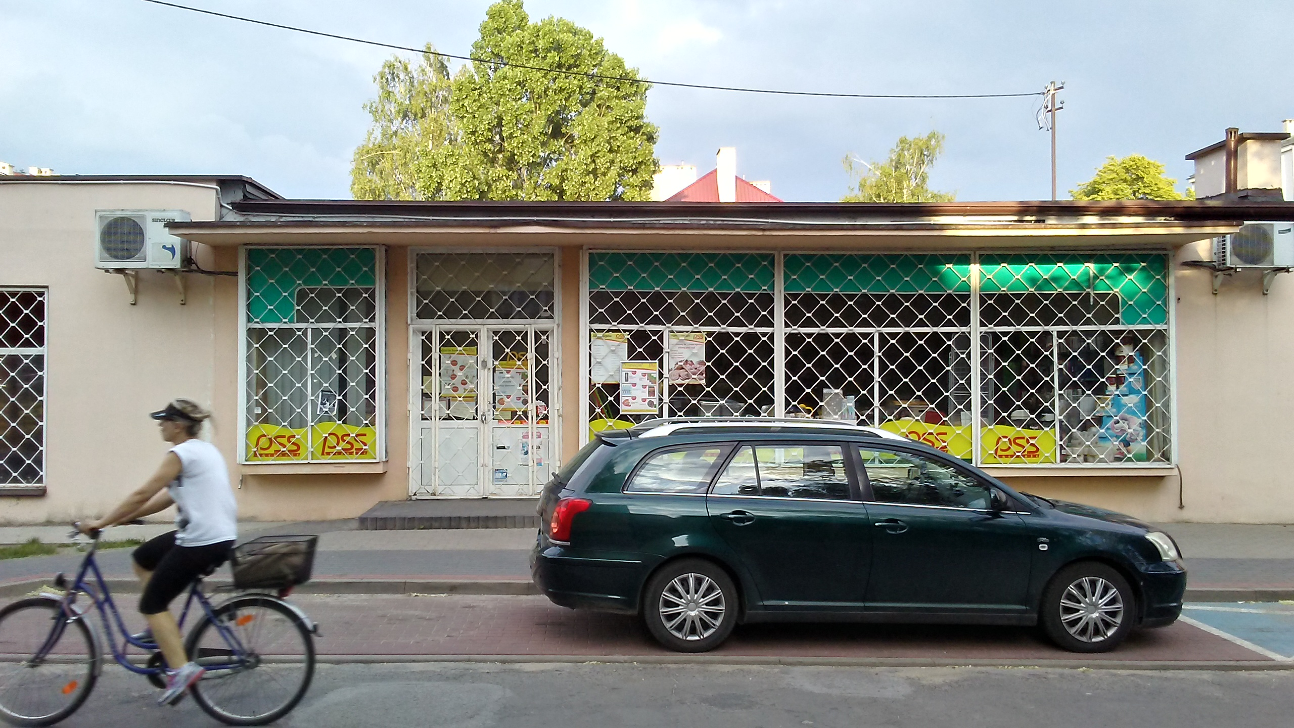 Jeden z ponad dwudziestu sklepów PSS Społem w Tomaszowie Mazowieckim. Ul.: Akacjowa 5, 13 maja 2018 roku